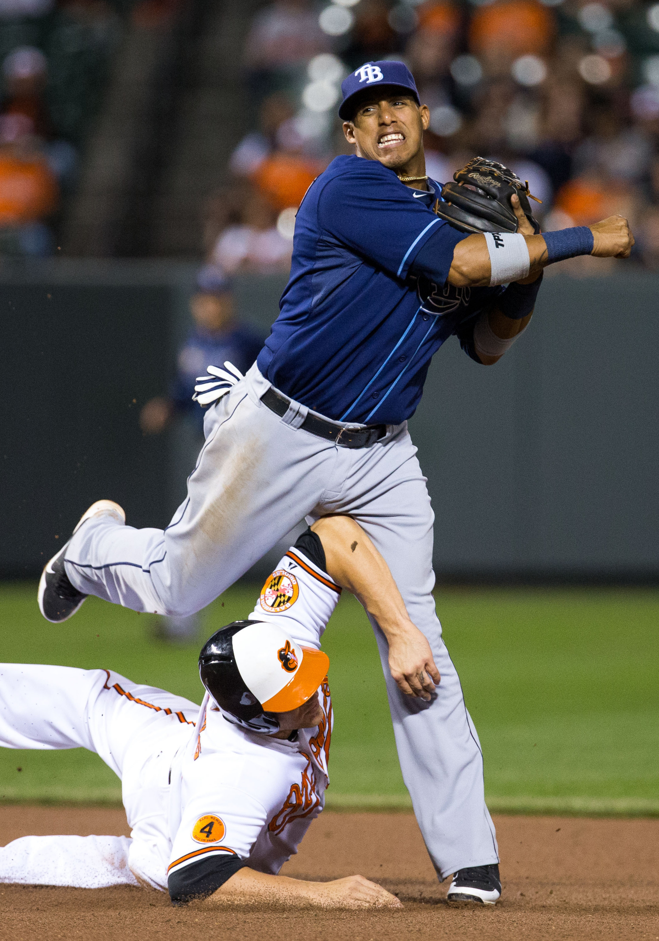 Yunel Escobar